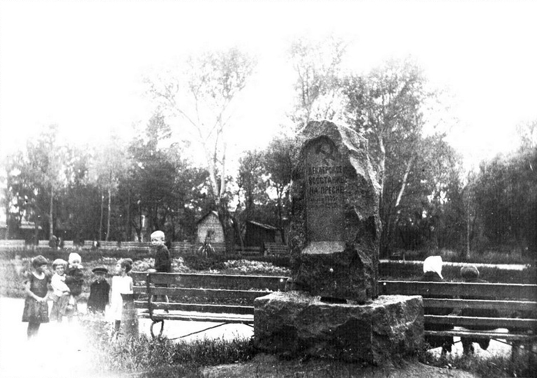 Памятник и сквер на месте сожженной в декабре 1905 г. мебельной фабрики Н. Шмита. Период создания: 1930 г. Материал, техника: фотопечать, фотобумага Размер: 11,5х16,6 Место создания: г. Москва Номер в Госкаталоге: 4926517 Номер по ГИК (КП): 6422/34-1 Местонахождение: Федеральное государственное бюджетное учреждение культуры "Государственный центральный музей современной истории России"